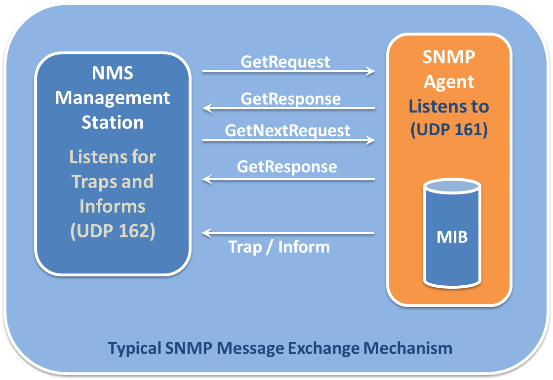 Монгол: SNMP мессежүүд